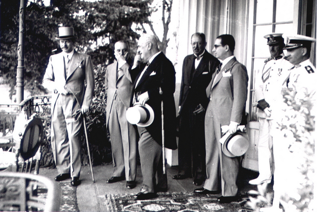 Carol II, Constantin Argetoianu and Ernest Urdăreanu, la Marele Derby